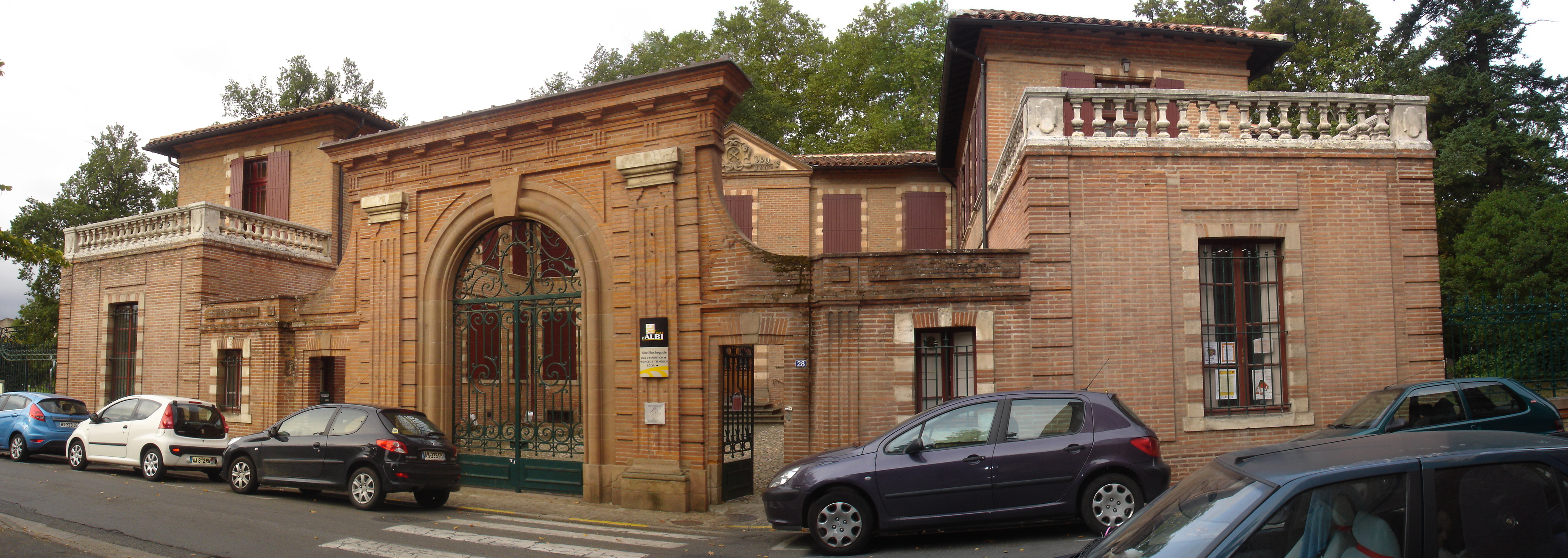 Façade de l'hôtel de Rochegude, vue depuis la rue Rochegude